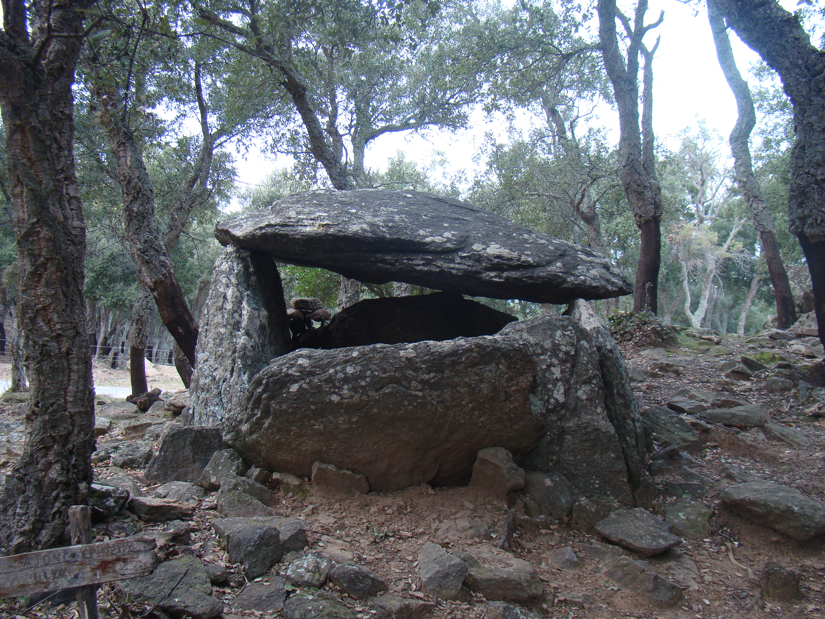 Dolmen de la Siureda vu de face